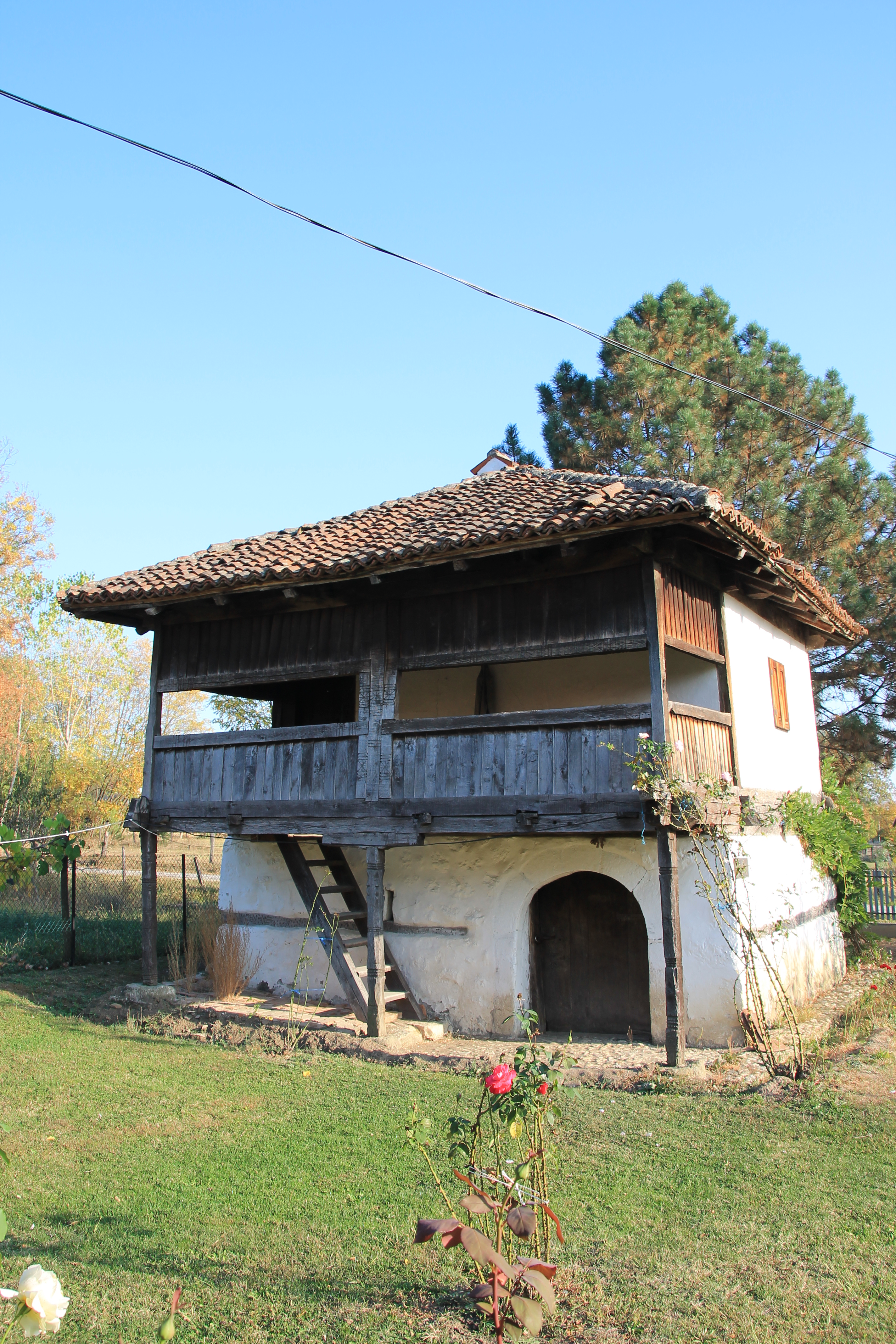 Čardak Podgorac Ingrutina